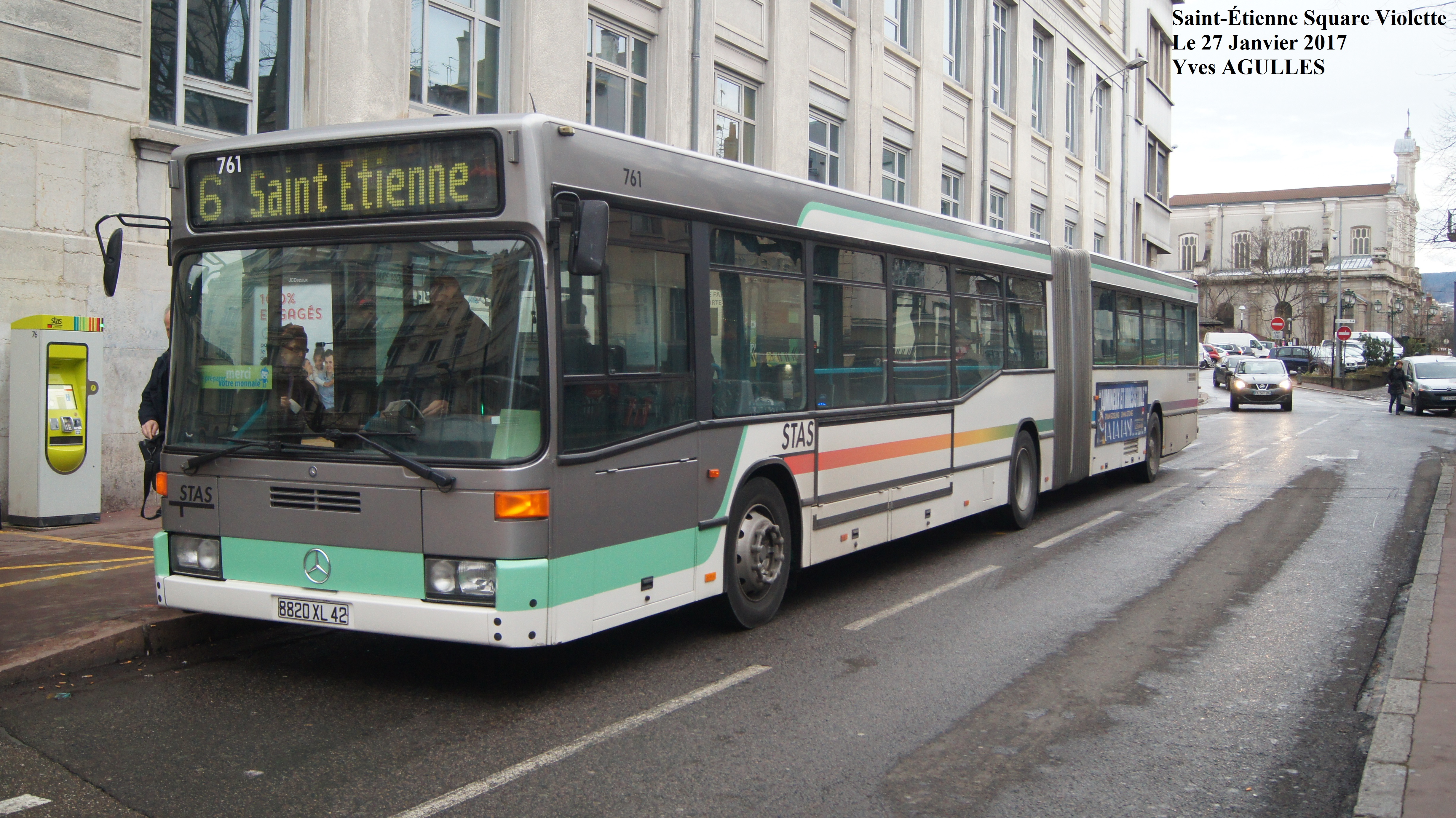 .Mercedes O405Gn N°761 ligne 6 square violette